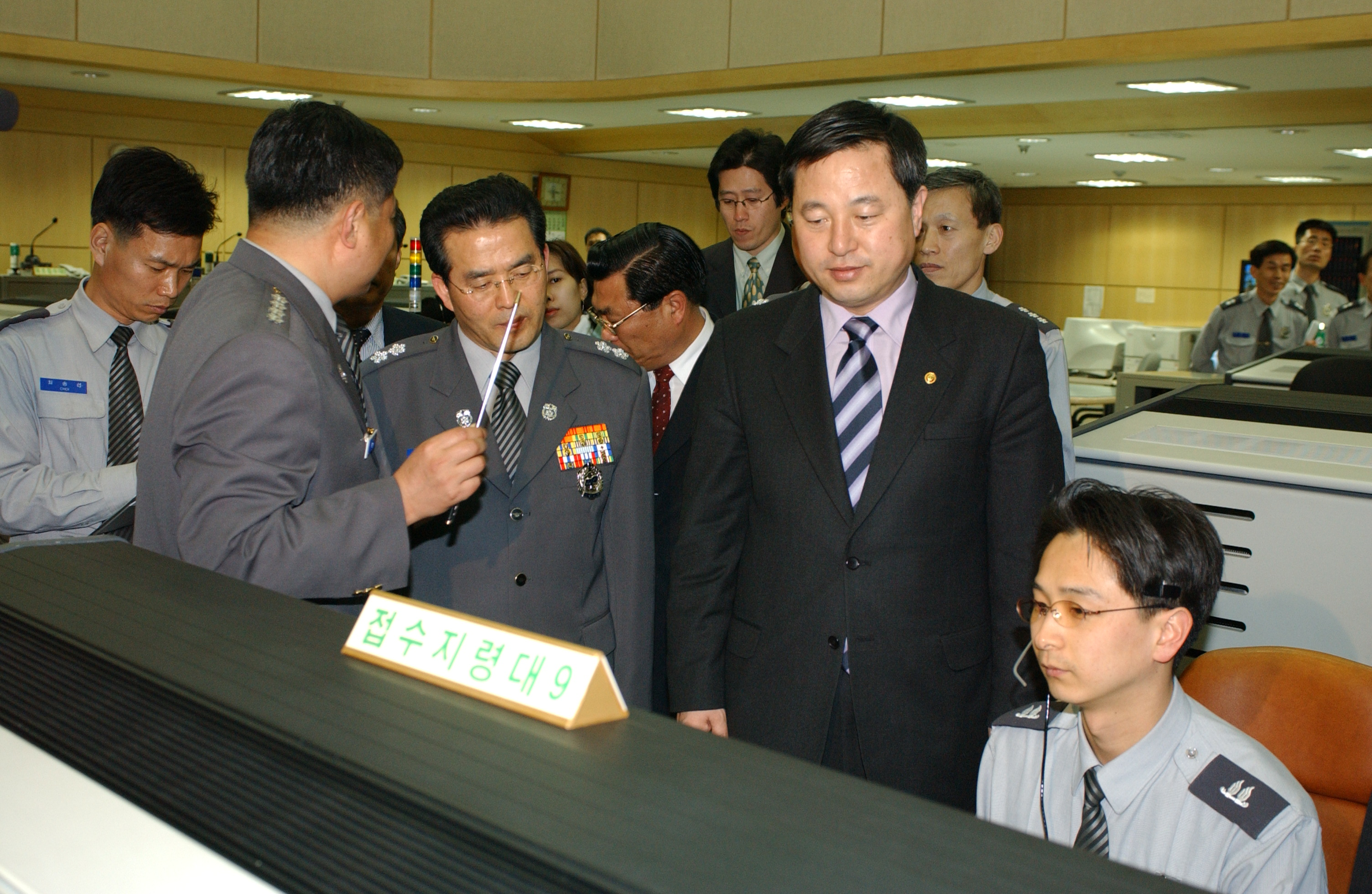 2003년 3월 26일 김두관 행정자치부 장관 서울종합방재센터 방문 서울특별시 소방재난본부 소장 사진 photos of Seoul Metropolitan Fire & Disaster Headquarters